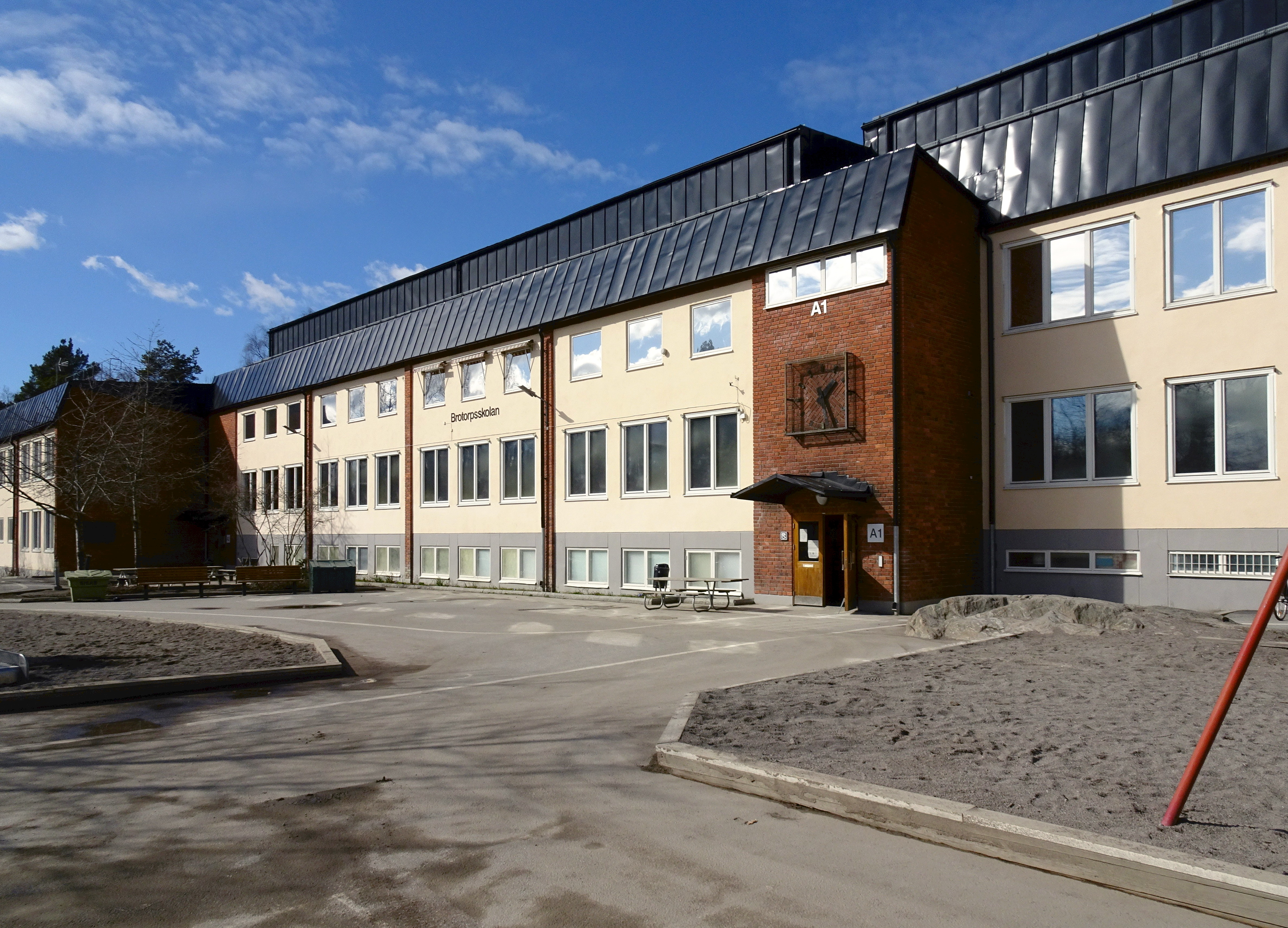 Brotorpsskolan, Rusthållarvägen 225, uppfördes 1956 (arkitekt var Einar Lovén)